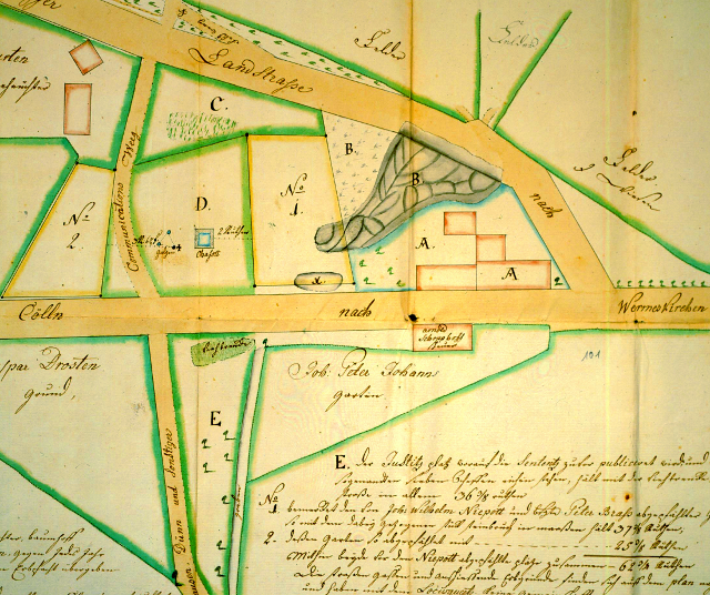 Wermelskirchen Galgenplatz am Schwanen 1780